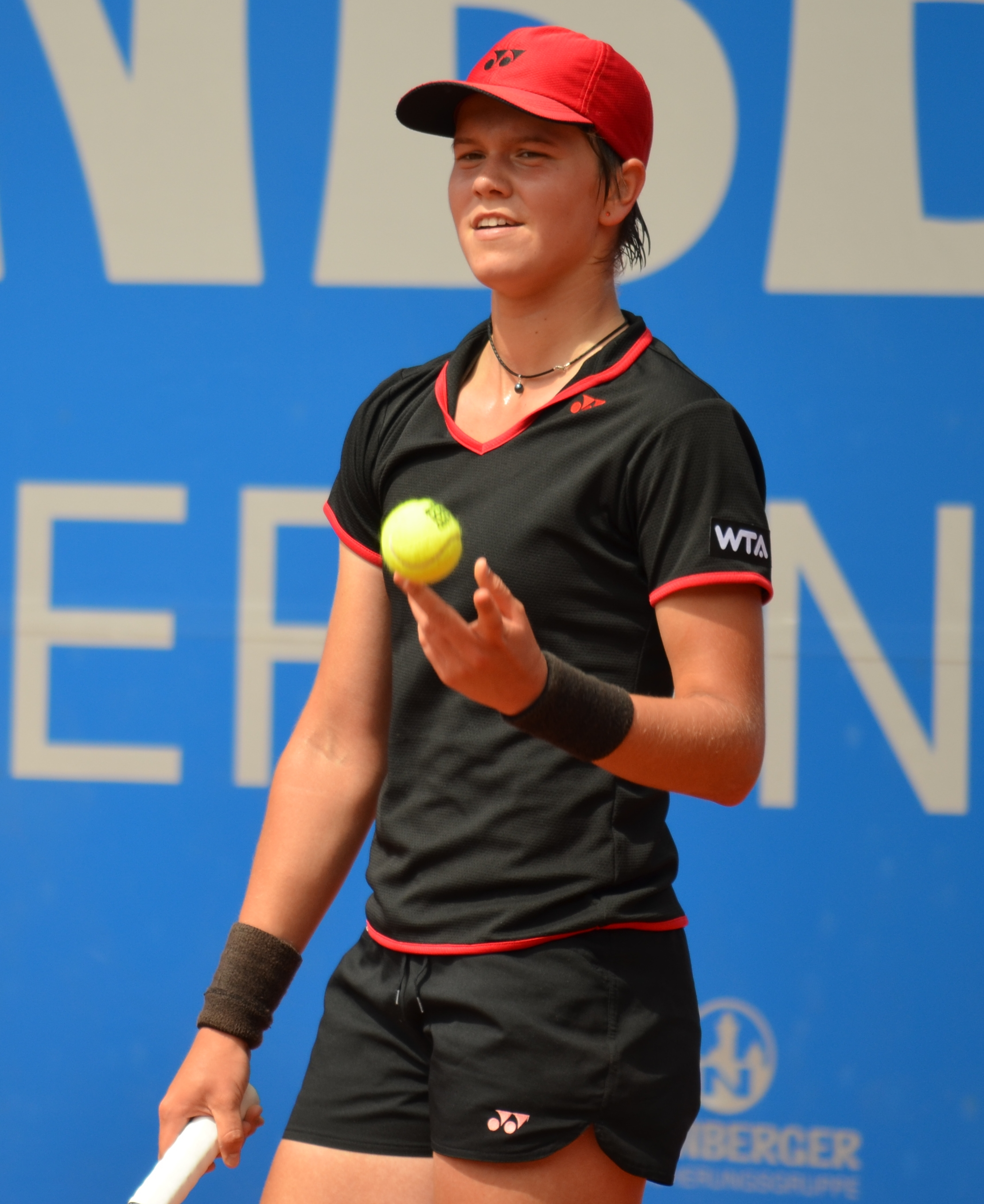 Katharina Gerlach bei der Qualifikation des Nürnberger Versicherungscup 2014 in der Begegnung gegen Ana Vrijic